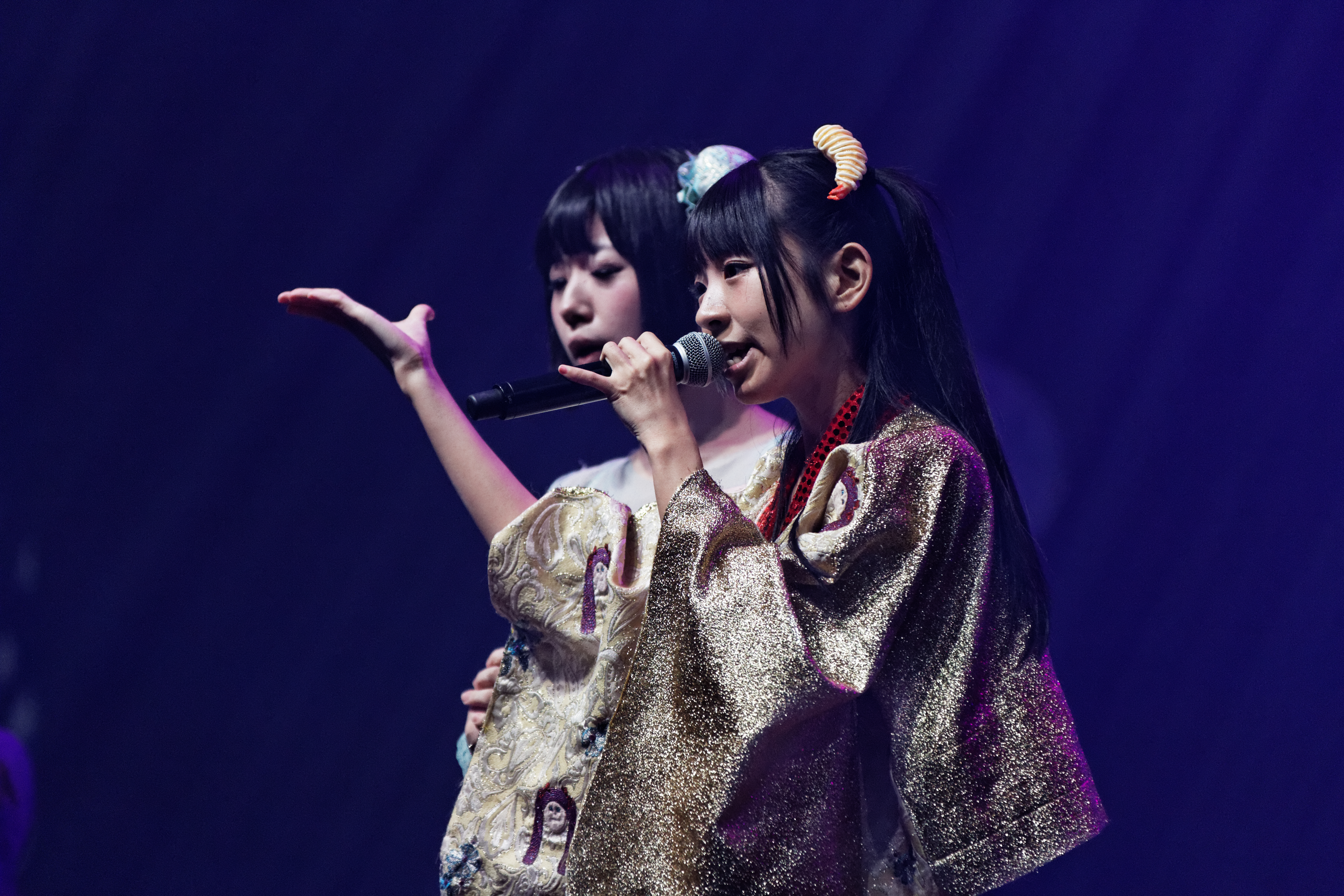 Dempagumi.inc en concert lors du live house du Japan expo Paris 2013.